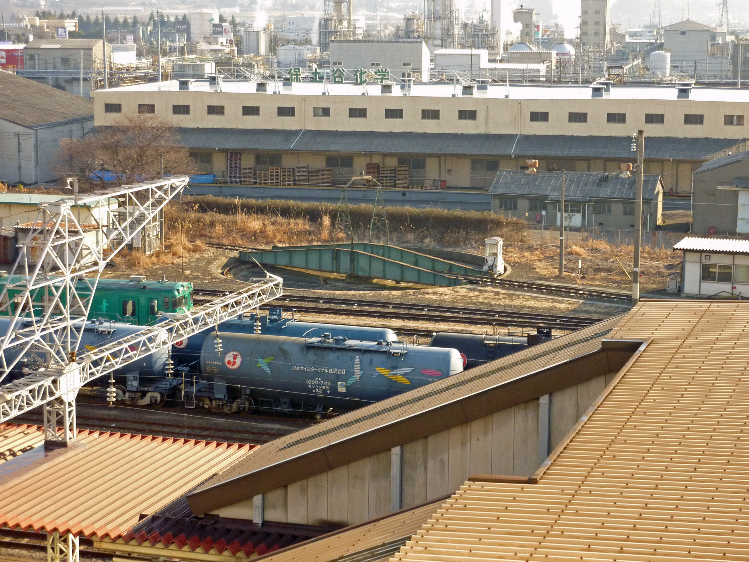 郡山駅構内転車台